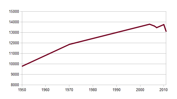 Bevölkerungsentwicklung Rödental